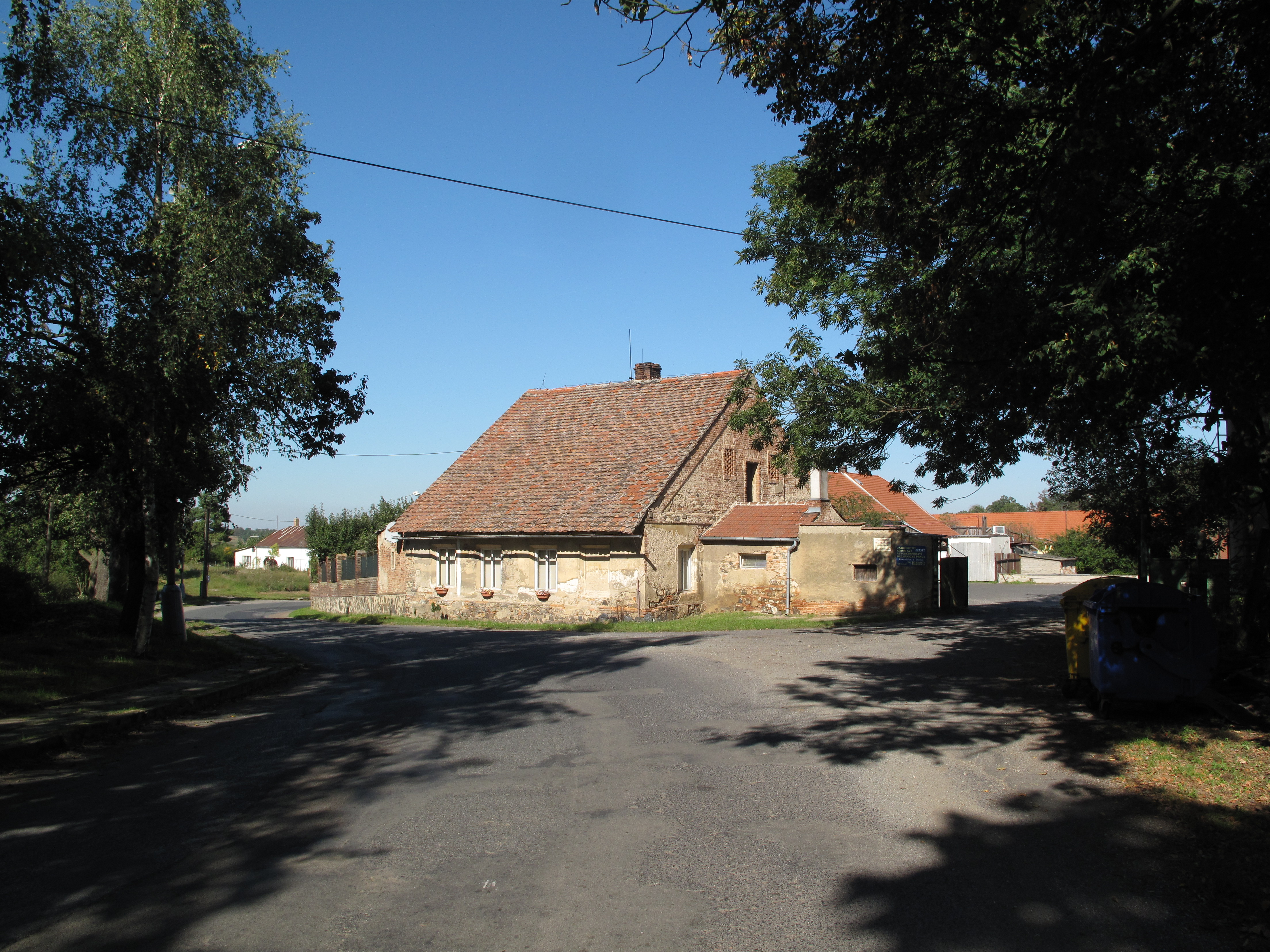 Česky: Drasty